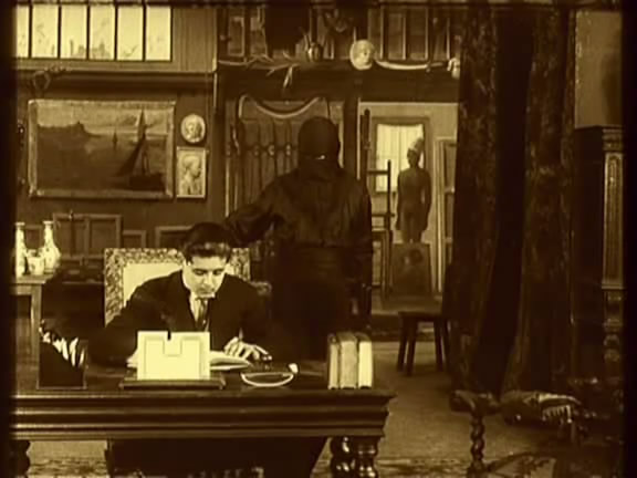 Photogramme du film "Le Mort qui tue" (1913, L. Feuillade), avec André Luguet.